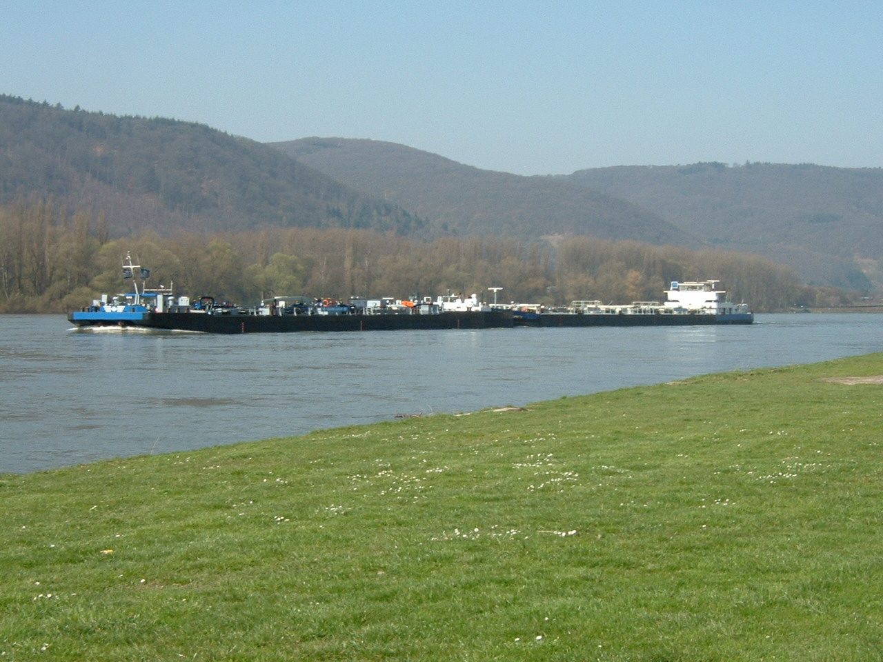 Tankkoppelverband